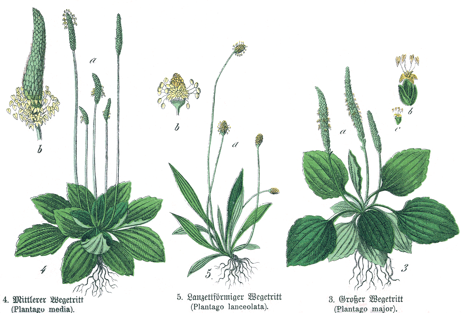 Illustration from «Naturgeschichte des Pflanzenreichs»